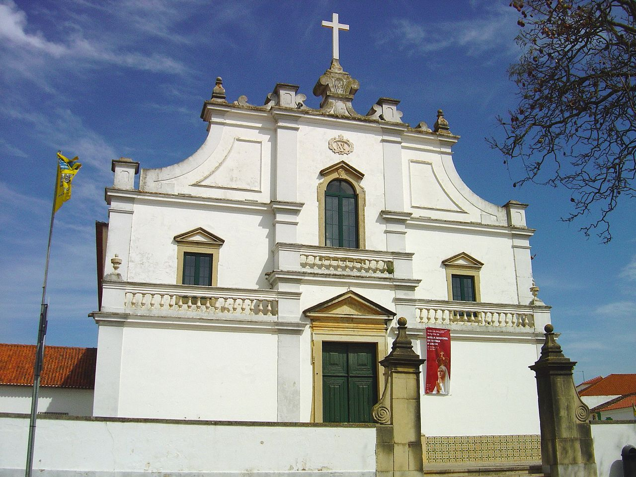 A Igreja Matriz de Lagoa situa-se no coração da vila, a partir do qual esta parece nascer. Do século XVIII, tem elementos exteriores da época barroca. No seu interior, repartem-se três naves, destacando-se a imagem da Nossa Senhora da Luz (padroeira da igreja), no altar-mor, e relicários dos séculos XVII e XVIII nos restantes altares. See where this picture was taken. [?]